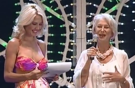 Foto scattata da me di Nathalie Caldonazzo ed Helen Mirren durante la quarantaquattresima edizione del Premio Barocco, svoltasi il 13 settembre 2013 presso il Teatro Italia di Gallipoli.